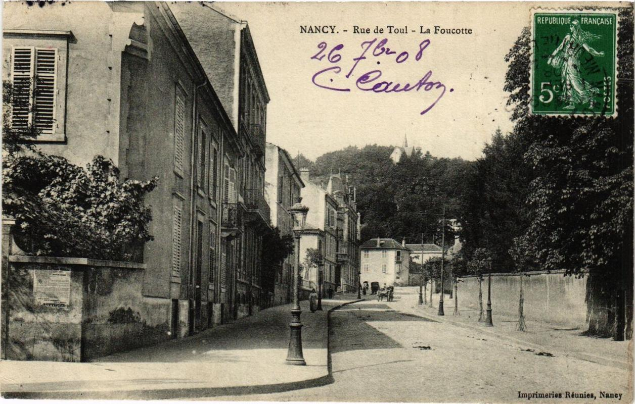 Carte postale ancienne, vue de la rue de Toul à Nancy, (actuelle avenue de la Libération) en direction de la Foucotte (vers le nord-ouest, à hauteur de la rue de Rome). Le point de vue est presque le même que celui du tableau d'Émile Friant intitulé "Jeune Nancéienne dans un paysage de neige".